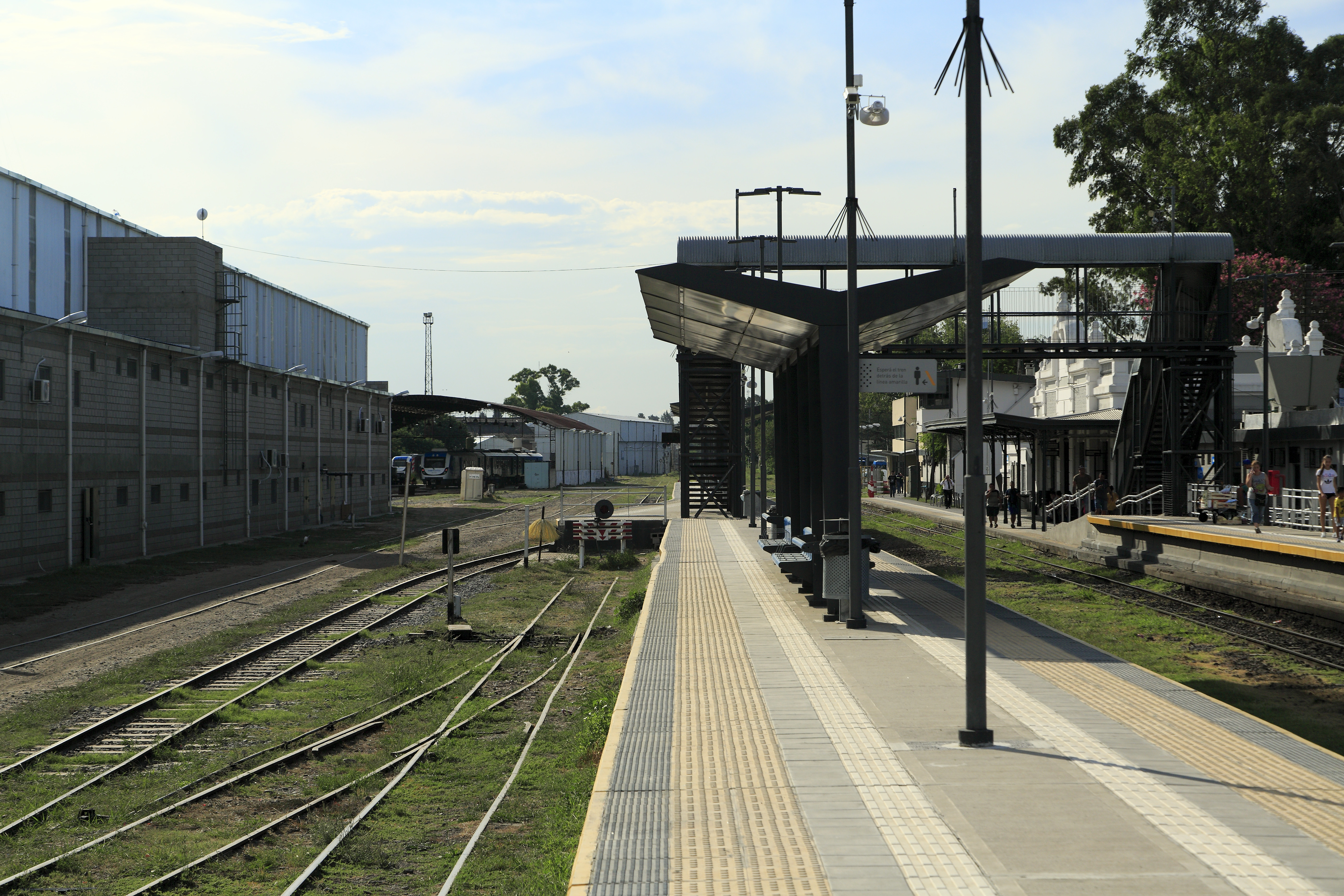 Bahnsteige Richtung Buenos Aires, die unterschiedlichen Höhen sind eine Folge der Betriebsführung während der Umstellung. Das Kopfgleis im Vordergrund links wird für die Anschlussgewährung genutzt, wegen des Betriebes mit Lokomotiven ist auch eine Umsetzmöglichkeit vorhanden.